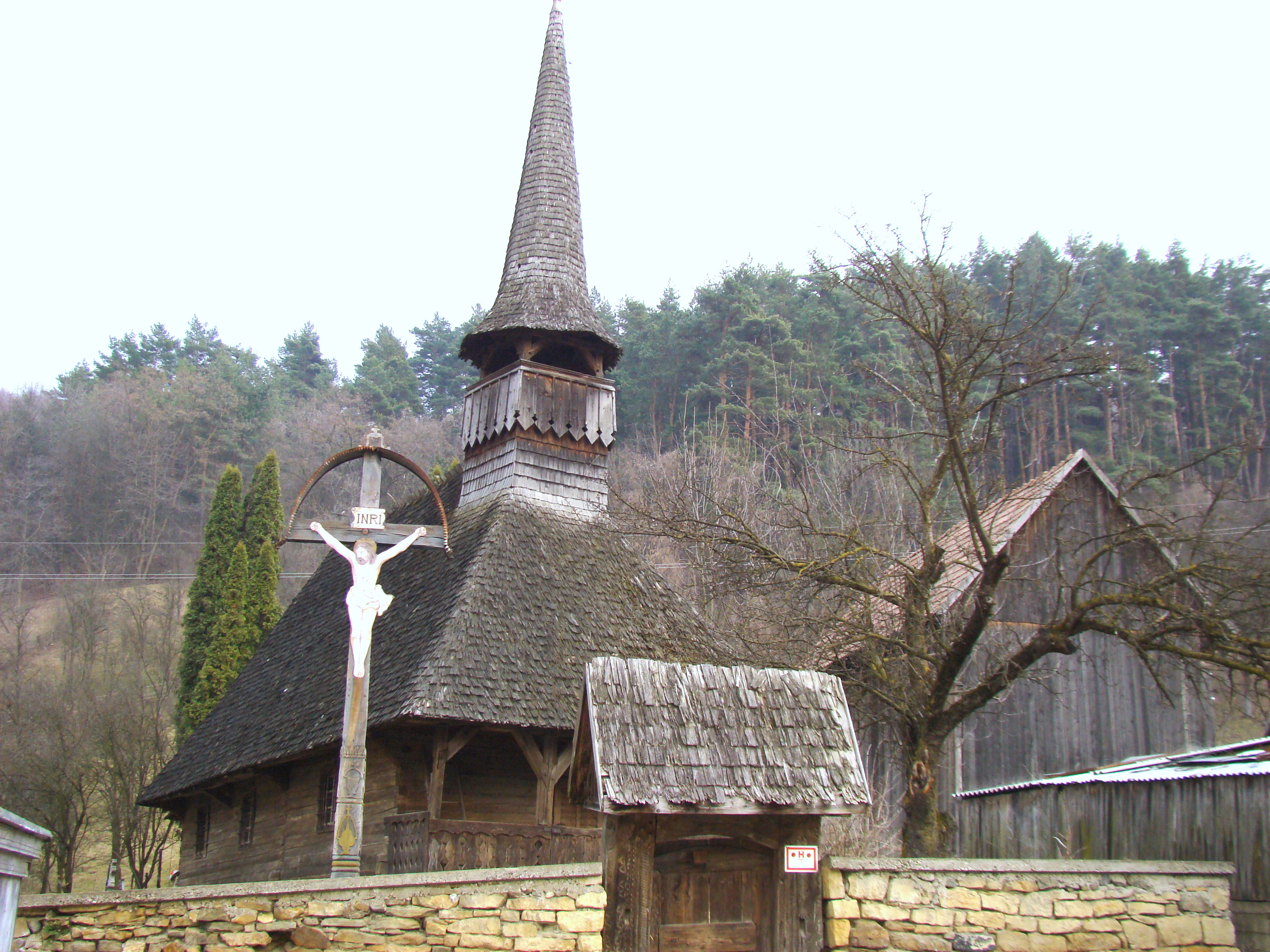 Biserica de lemn „Pogorârea Sf.Duh” din Someșu Rece, județul Cluj